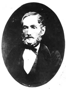 Auto-retrato de Hércules Florence.